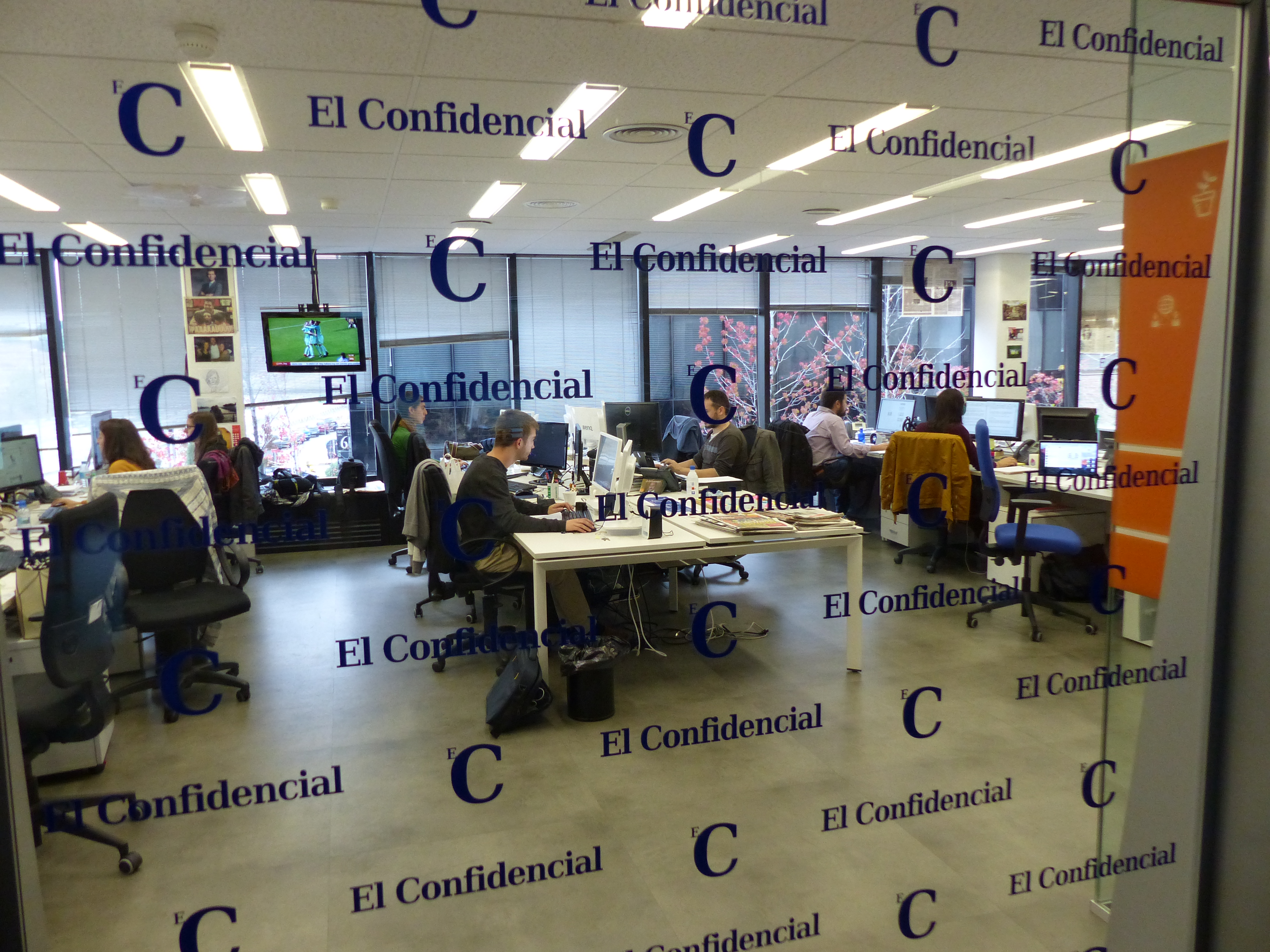 Oficinas de El Confidencial en Pozuelo de Alarcón, Madrid